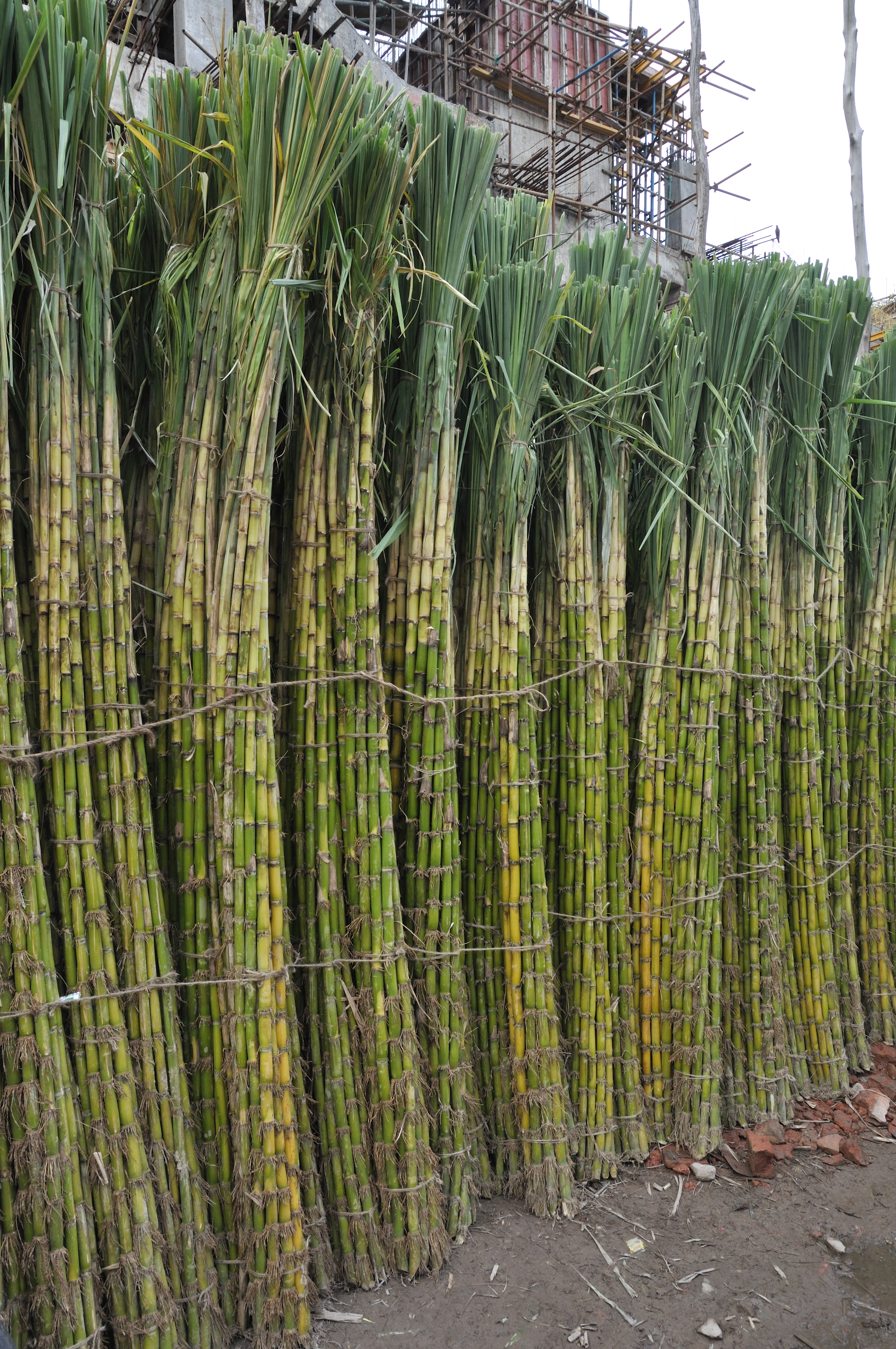 Sugarcane are displayed fo sale at College street market, Kolkata